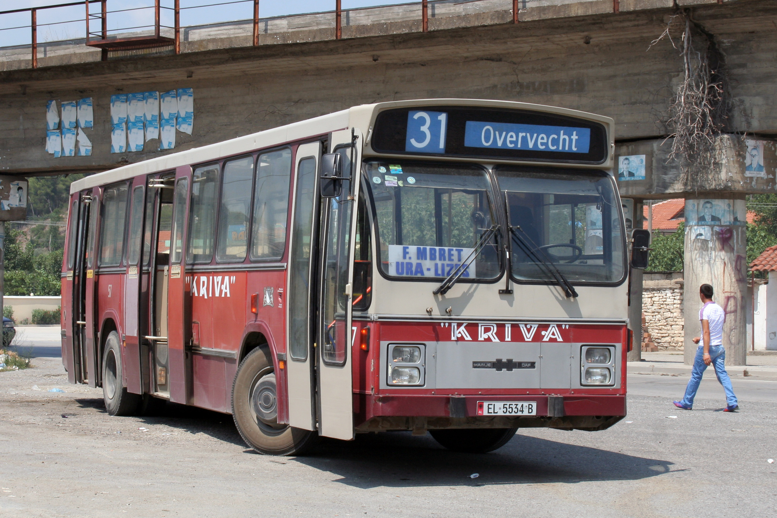 Oude huisstijl van de CSA2 bussen, hier toegepast op een voormalige GVU bus. Deze wagen rijdt op de foto op de stadsdienst van Elbasan.